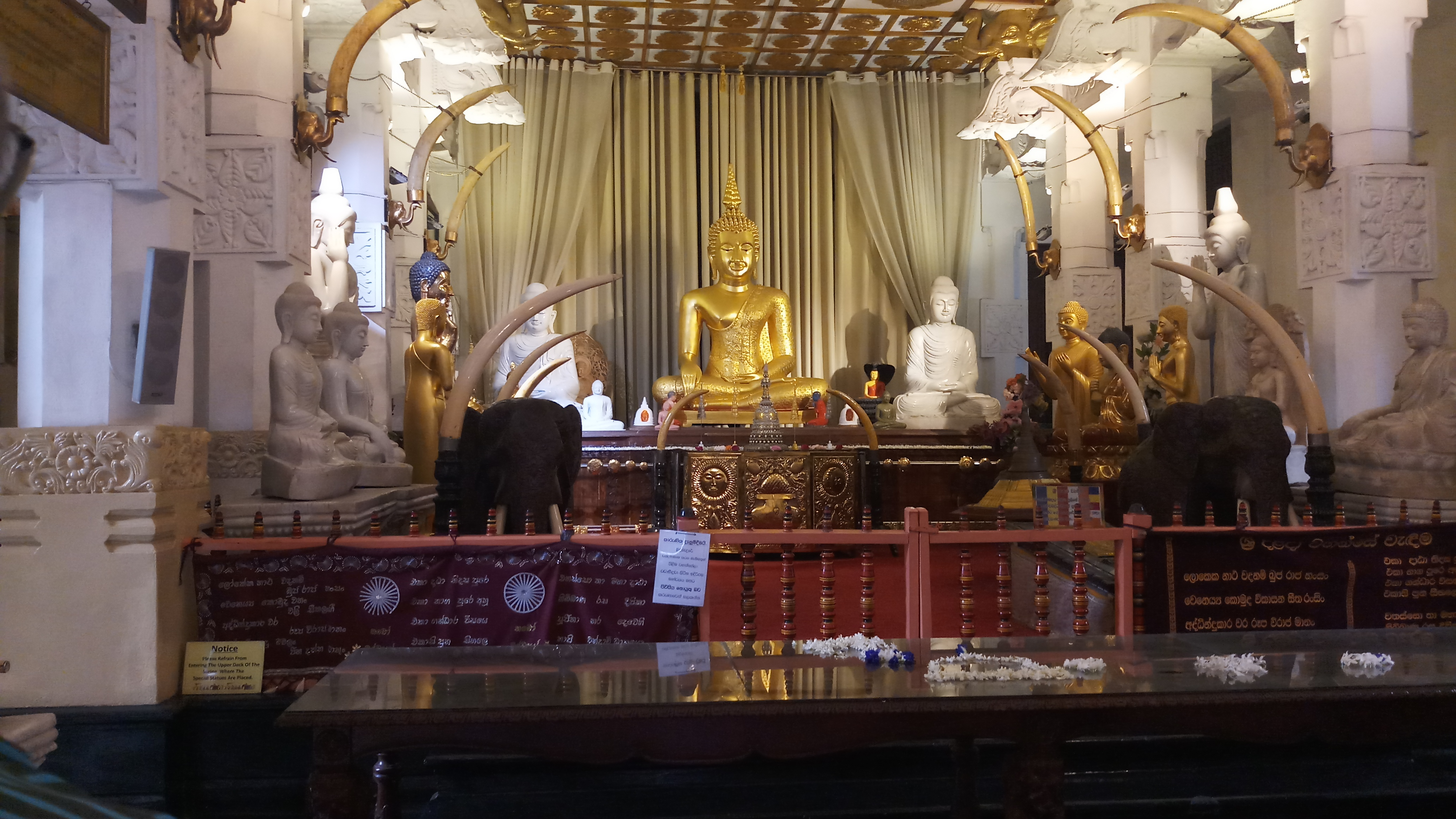 புத்தரின் புனிதப் பல் இருக்கும் இடம்.